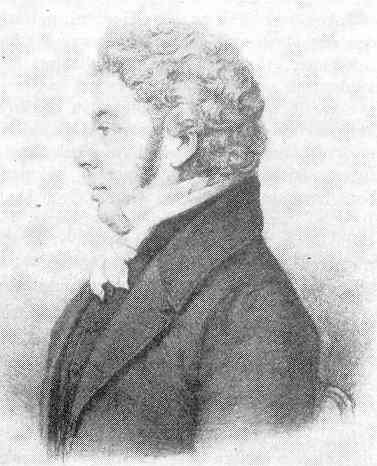 Samuel Hedborn, 1800-tals litografi.